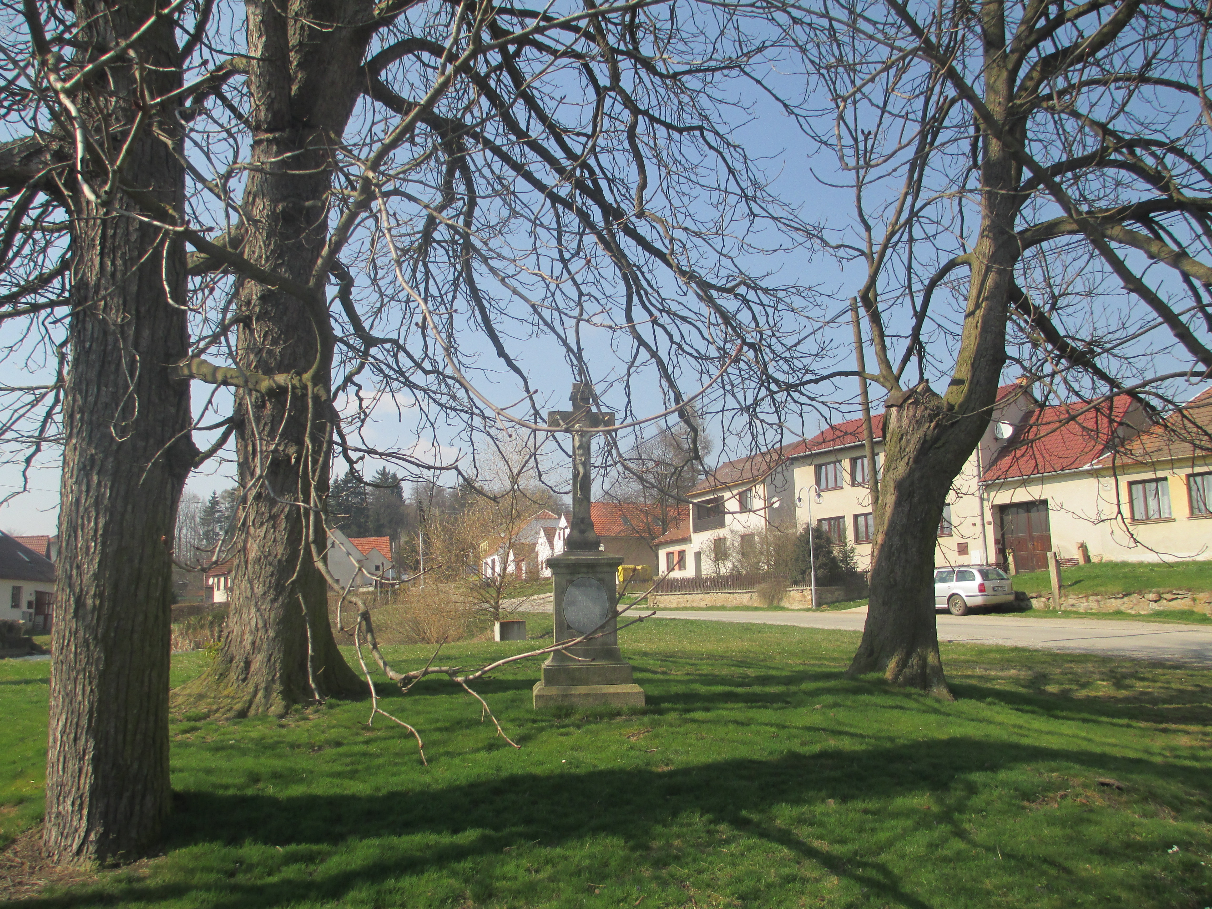 Křížek pod čtyřmi kaštany.